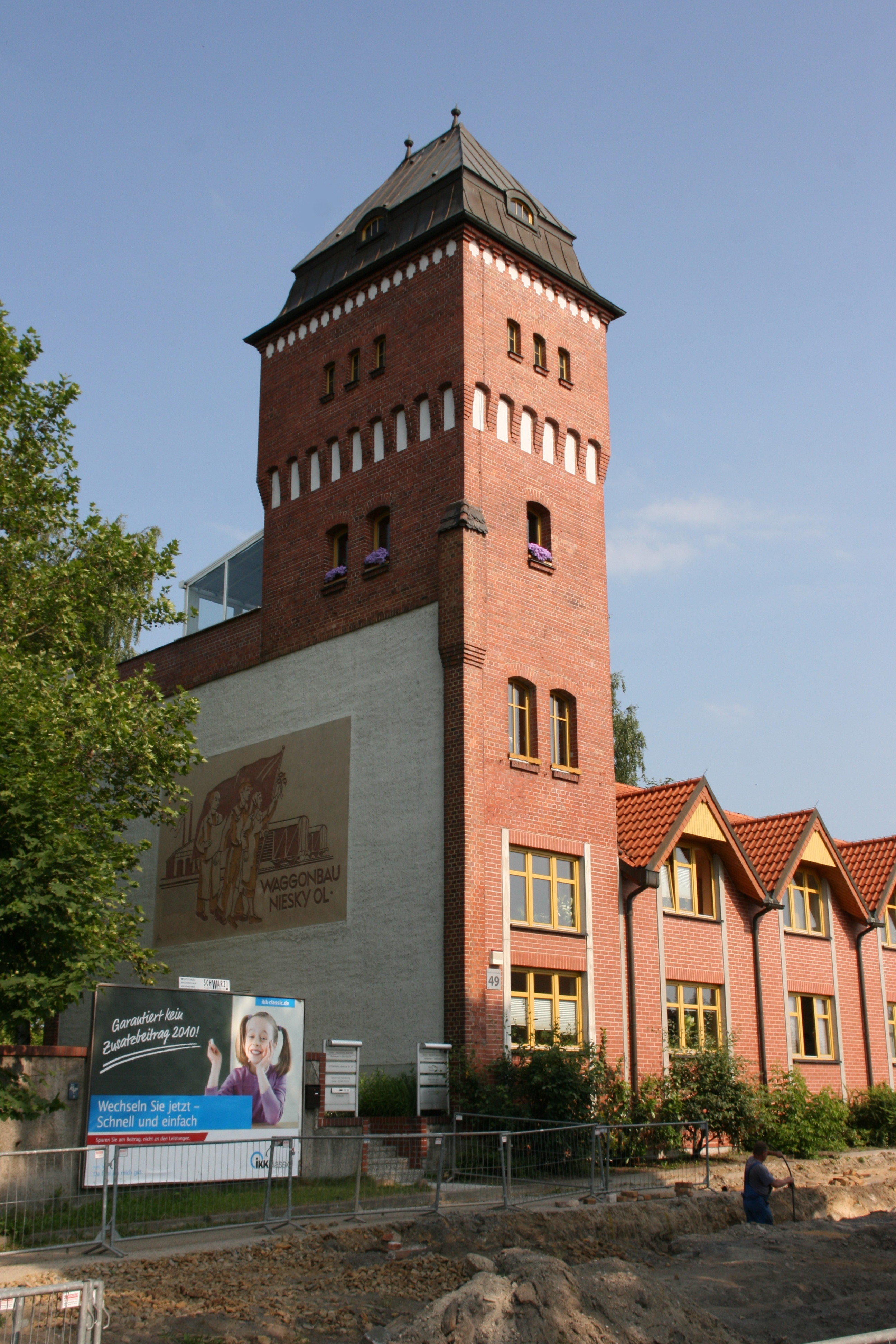 DB Waggonbau Niesky, Altbau an der Muskauer Straße in Niesky